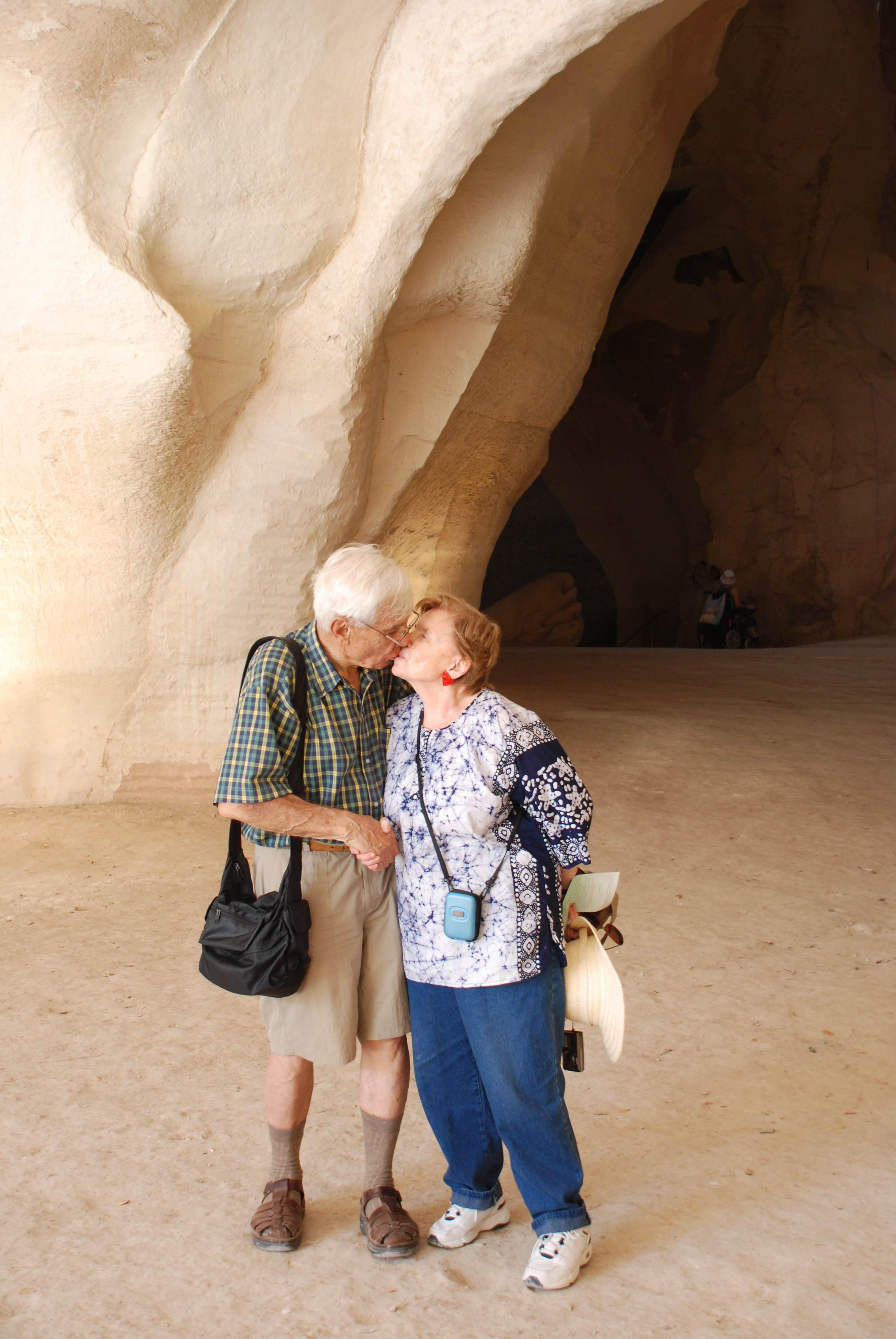 עיר קדומה בשפלת יהודה, בין נחל גוברין לנחל מרשה, סמוך לקיבוץ בית גוברין. נזכרת בכתביו של יוסף בן מתתיהו (יוספוס פלאביוס) כ"בית גברי", ובמקורות חז"ל כ "בית גובריא". משמעו של השם בארמית הוא "בית הגברים", וע"פ המדרש ישבו במערות סביב היישוב ענקים, ומכאן שמה. ביוני 2014 הכריז ארגון אונסק"ו על בית גוברין ומרשה הסמוכה כאתר מורשת עולמית.